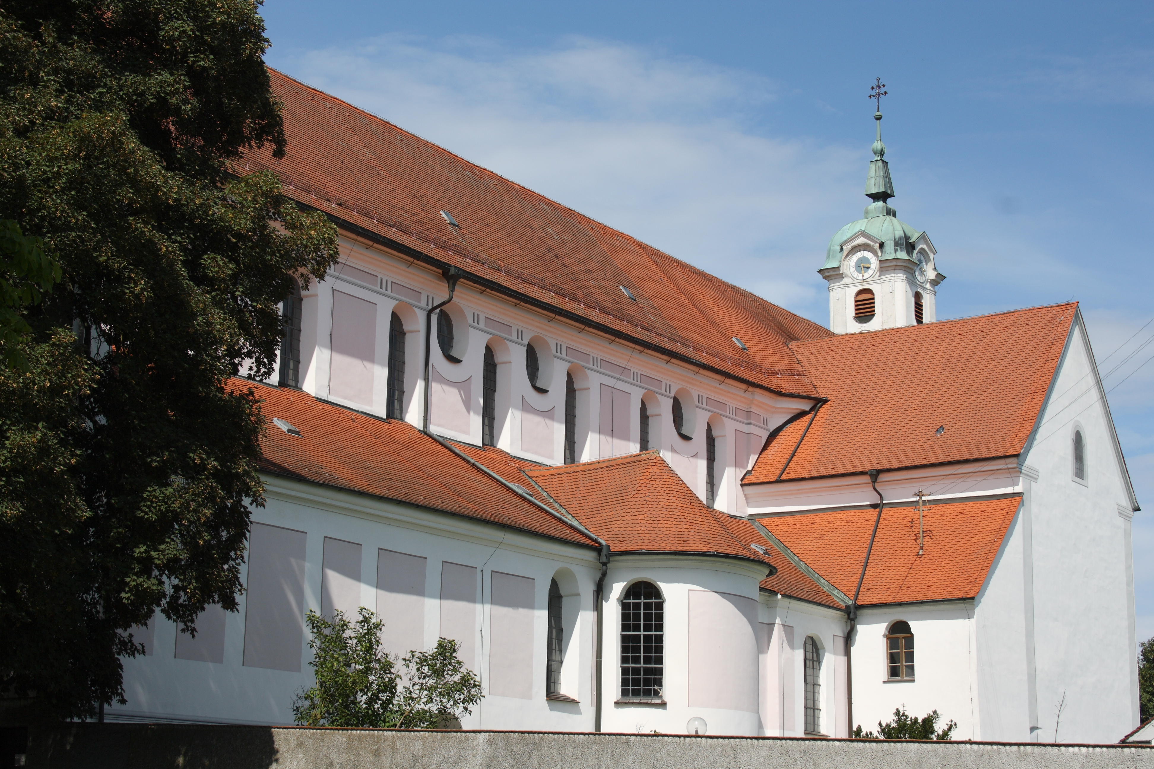 Katholische Pfarr- und Wallfahrtskirche St. Peter und Paul in Oberelchingen, einem Ortsteil von Elchingen im Landkreis Neu-Ulm (Bayern)